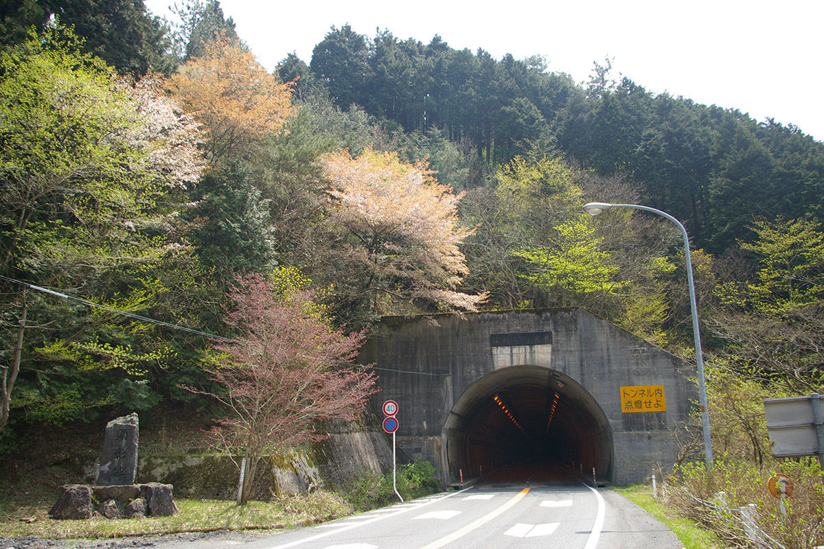 Hanaore tunnel